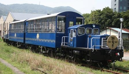 門司港レトロ観光線で運行されるDB10形とトラ70000形。